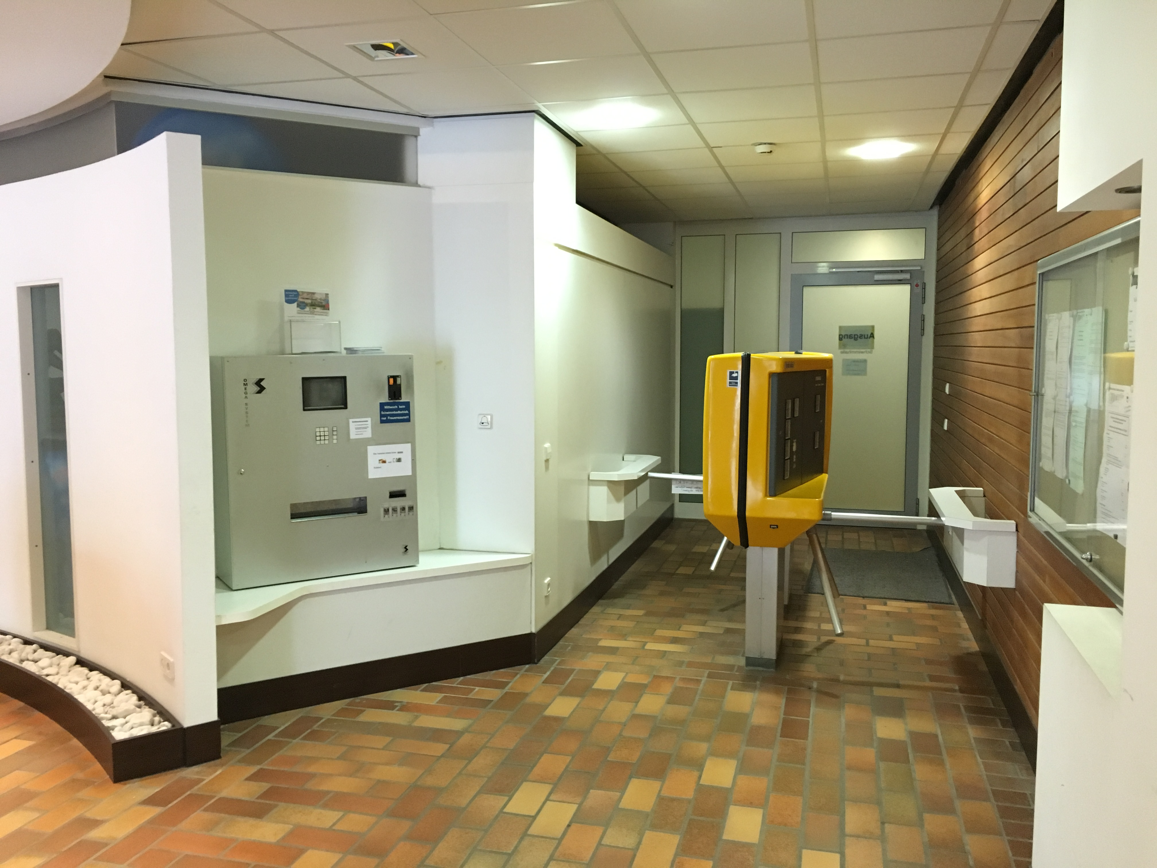 Schwimmbad Krankenhaus TBB - Schrankenkreuz